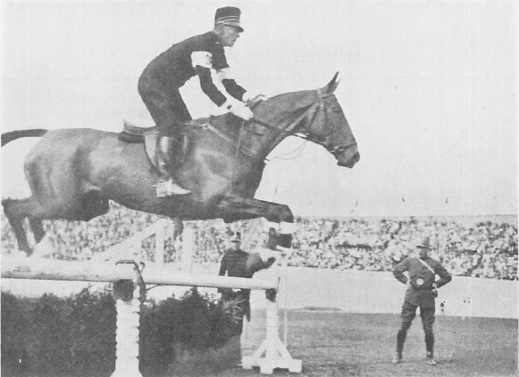 Le cavalier allemand Charles Pahud de Mortanges sur Marcroix aux jeux olympiques d'Amsterdam en 1928.